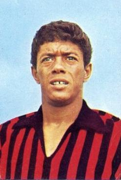 Amarildo Tavares da Silveira en 1965 au Milan AC - Nuova CALCIATORI PANINI 1965-66